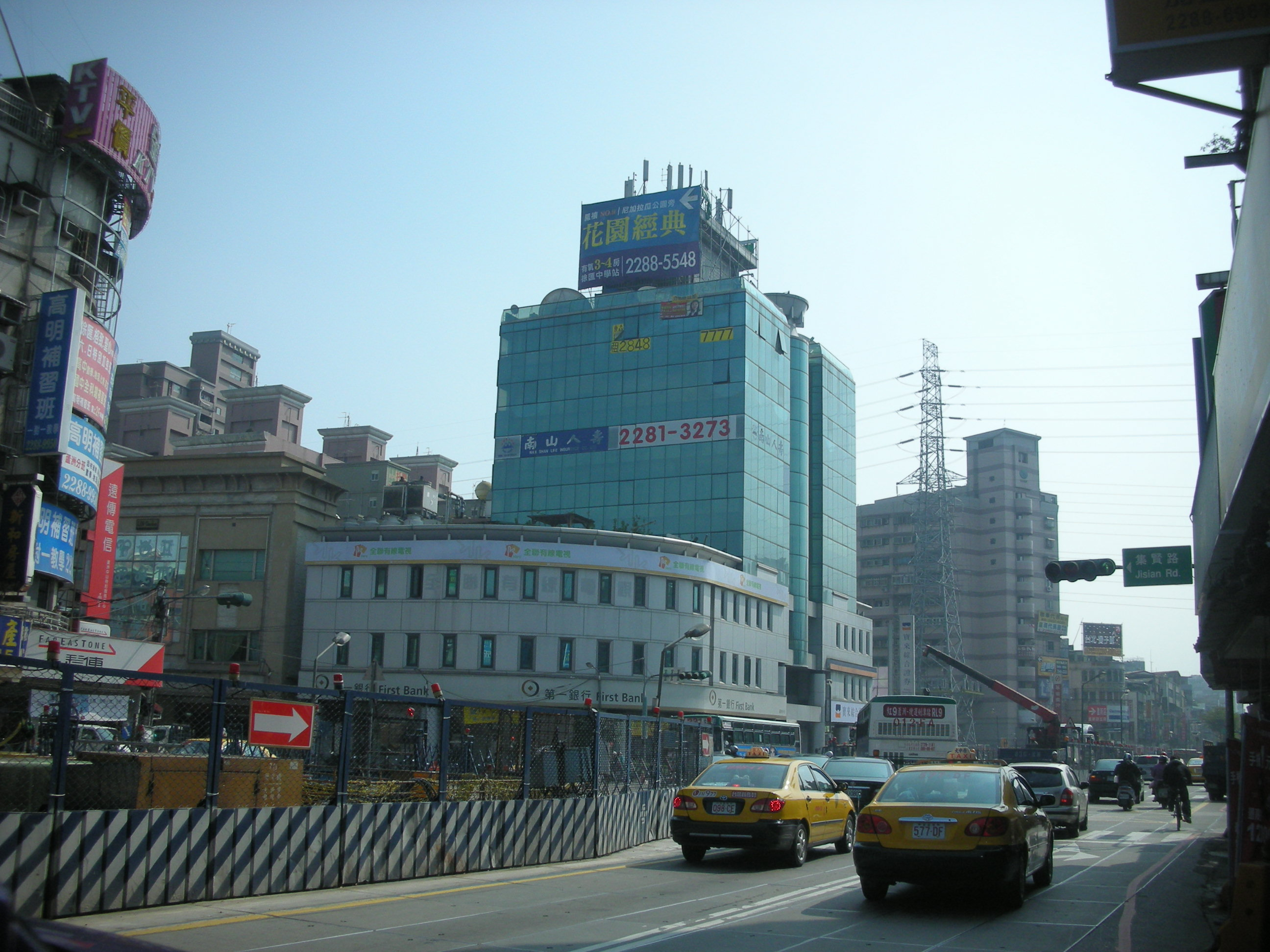 全聯有線電視總部與第一商業銀行蘆洲分行。